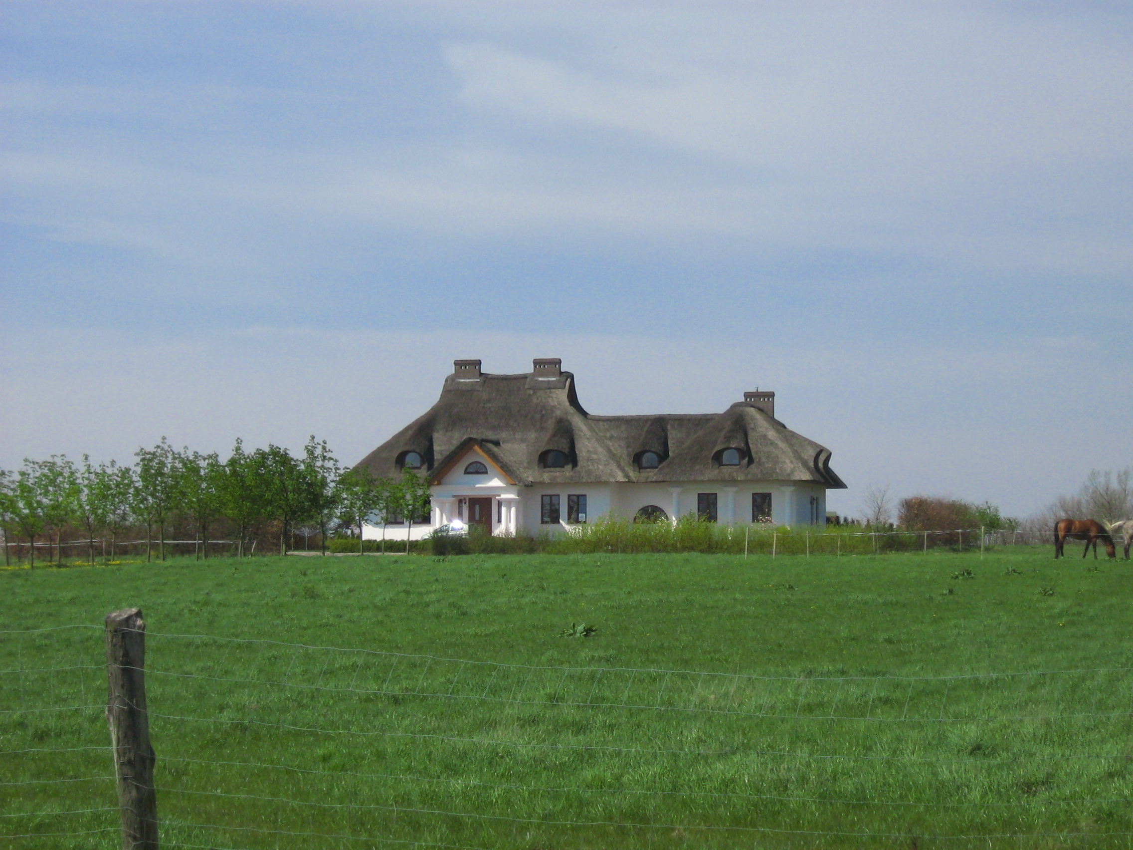 Dom w Łuskowie